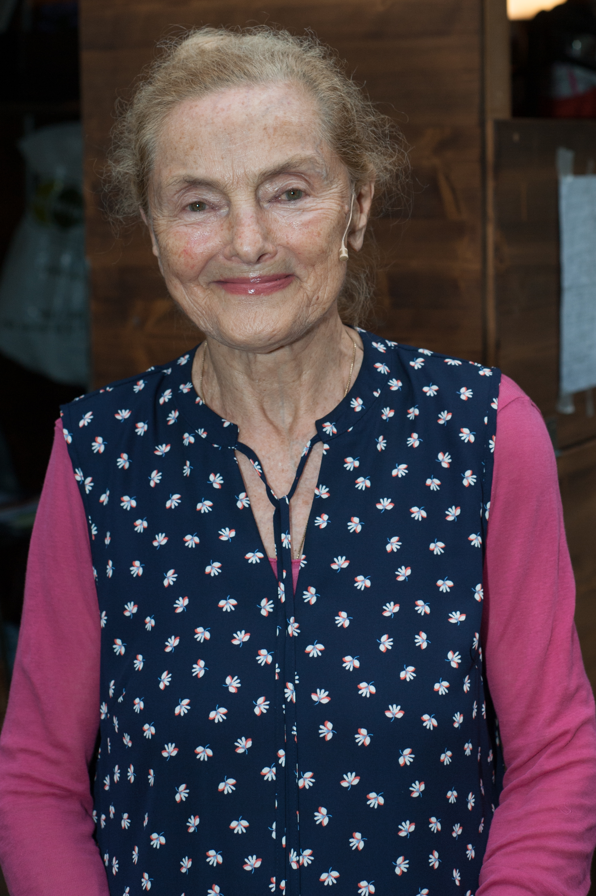 Sommernachtskomödie Rosenburg 2016, Premiere von Kalender Girls am 30. Juni 2016. Bild zeigt Erni Mangold.